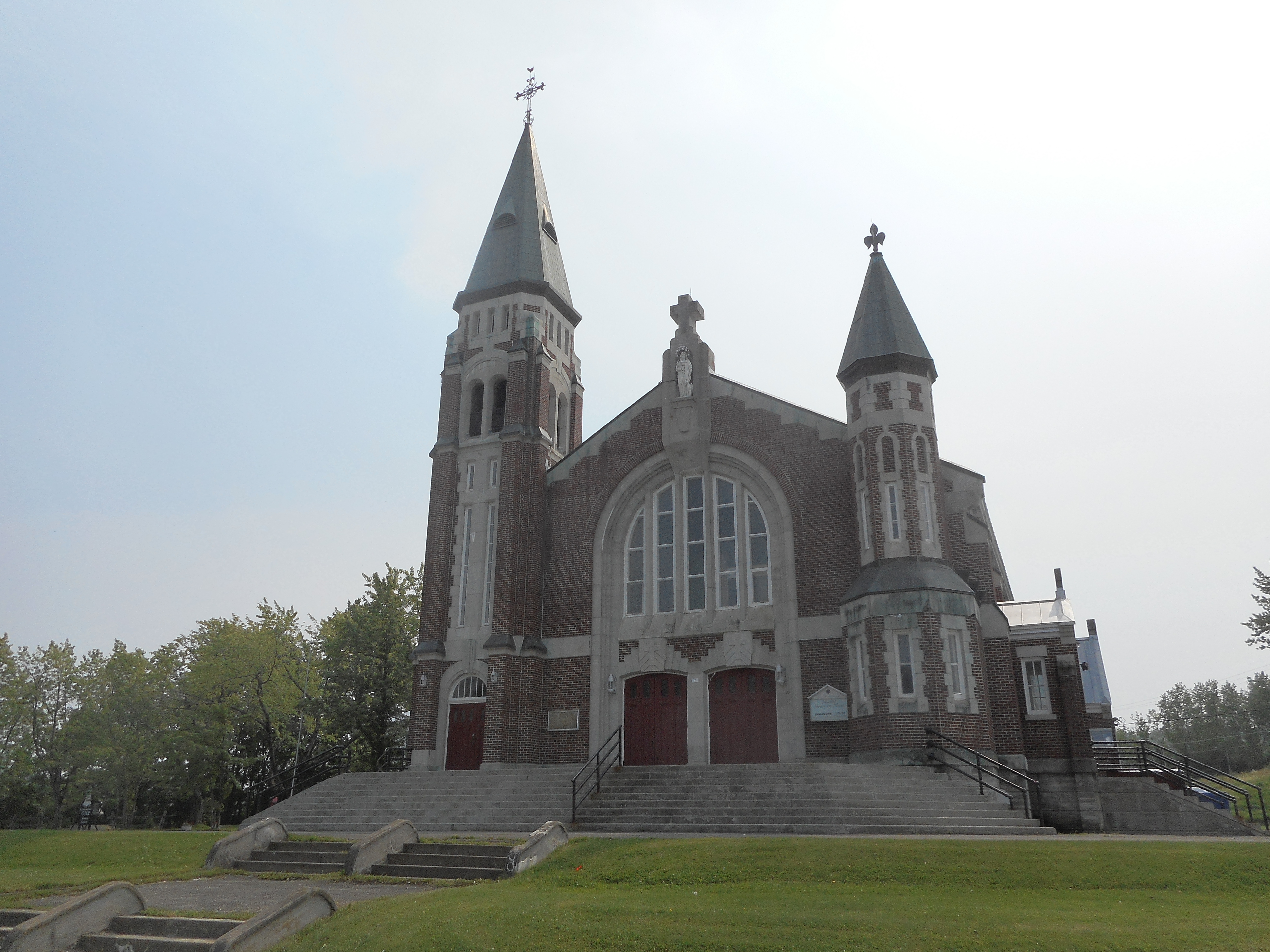 Église de Saint-Jean-l'Évangéliste, rue de l'Église, Nouvelle, Québec